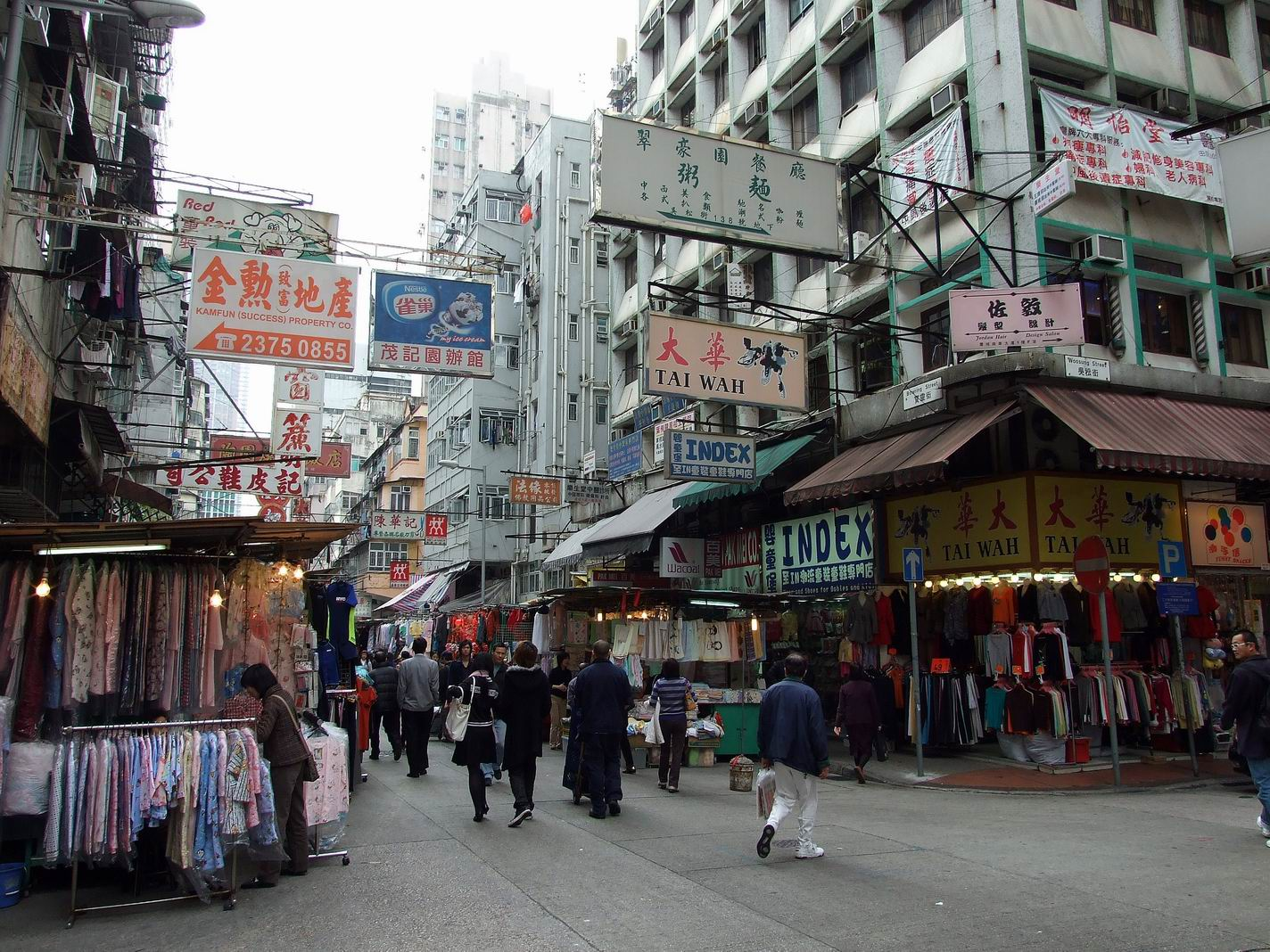 寶靈街